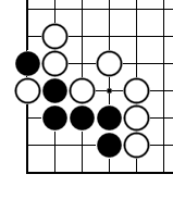 詰棋問題1